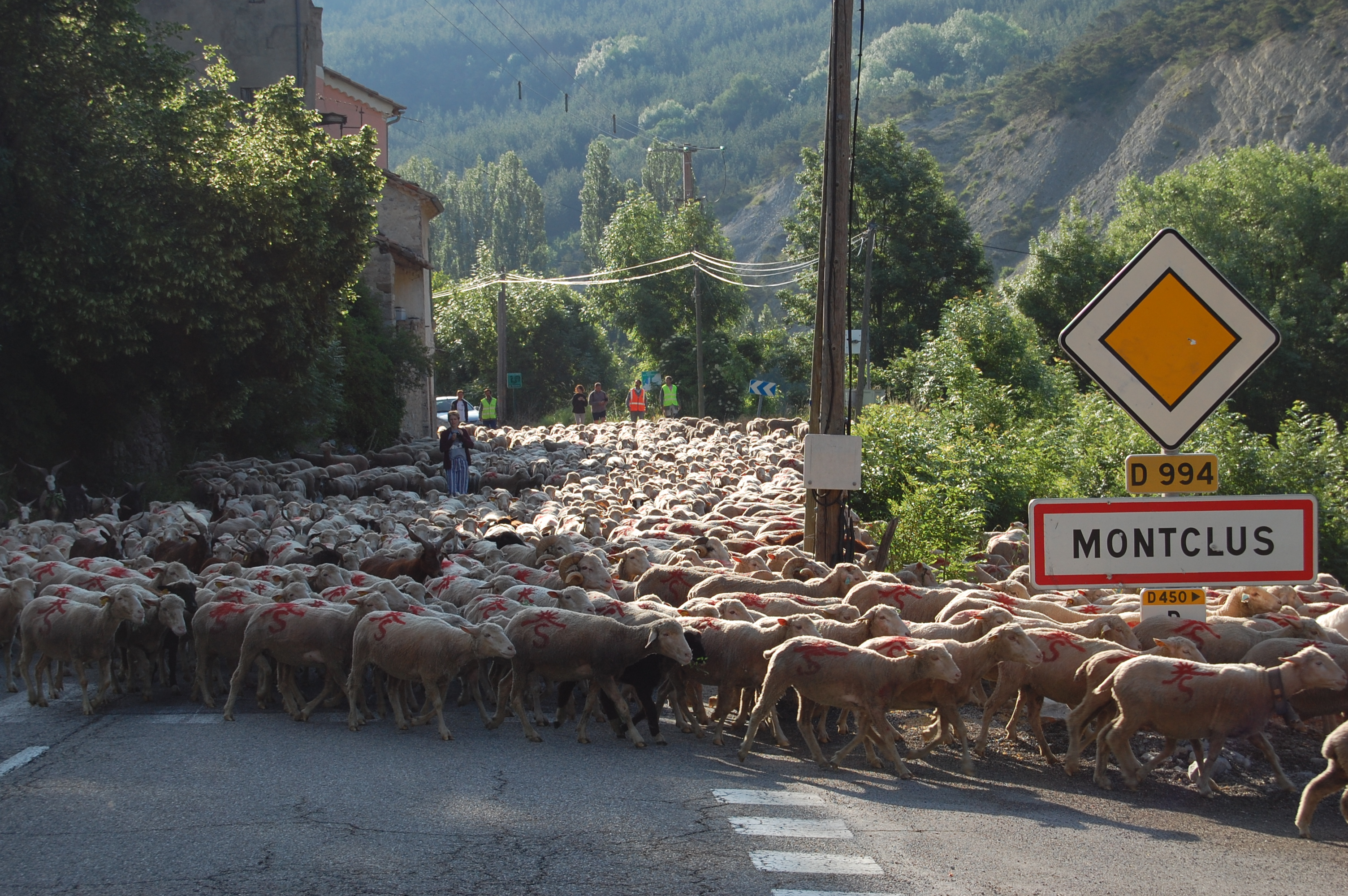 Transhumance d'un troupeau de brebis arrivant à Montclus